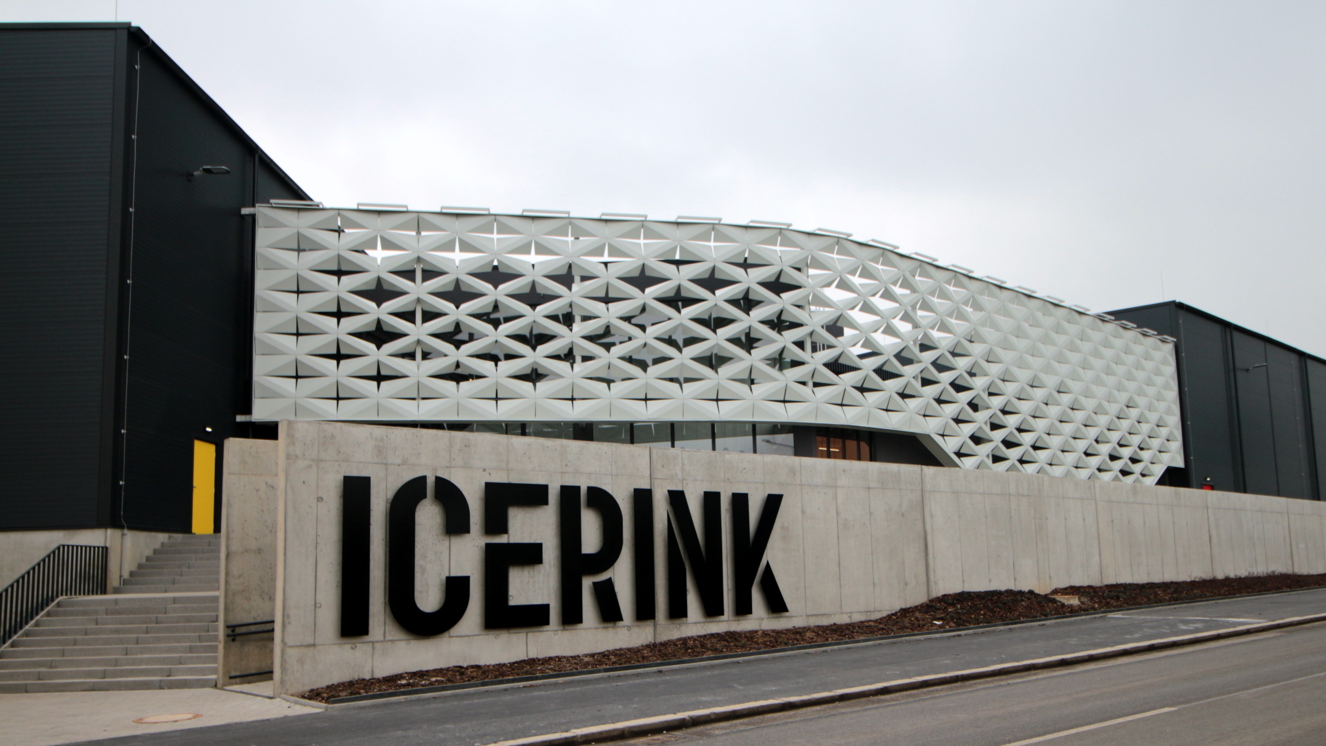 Škoda IceRink Praha